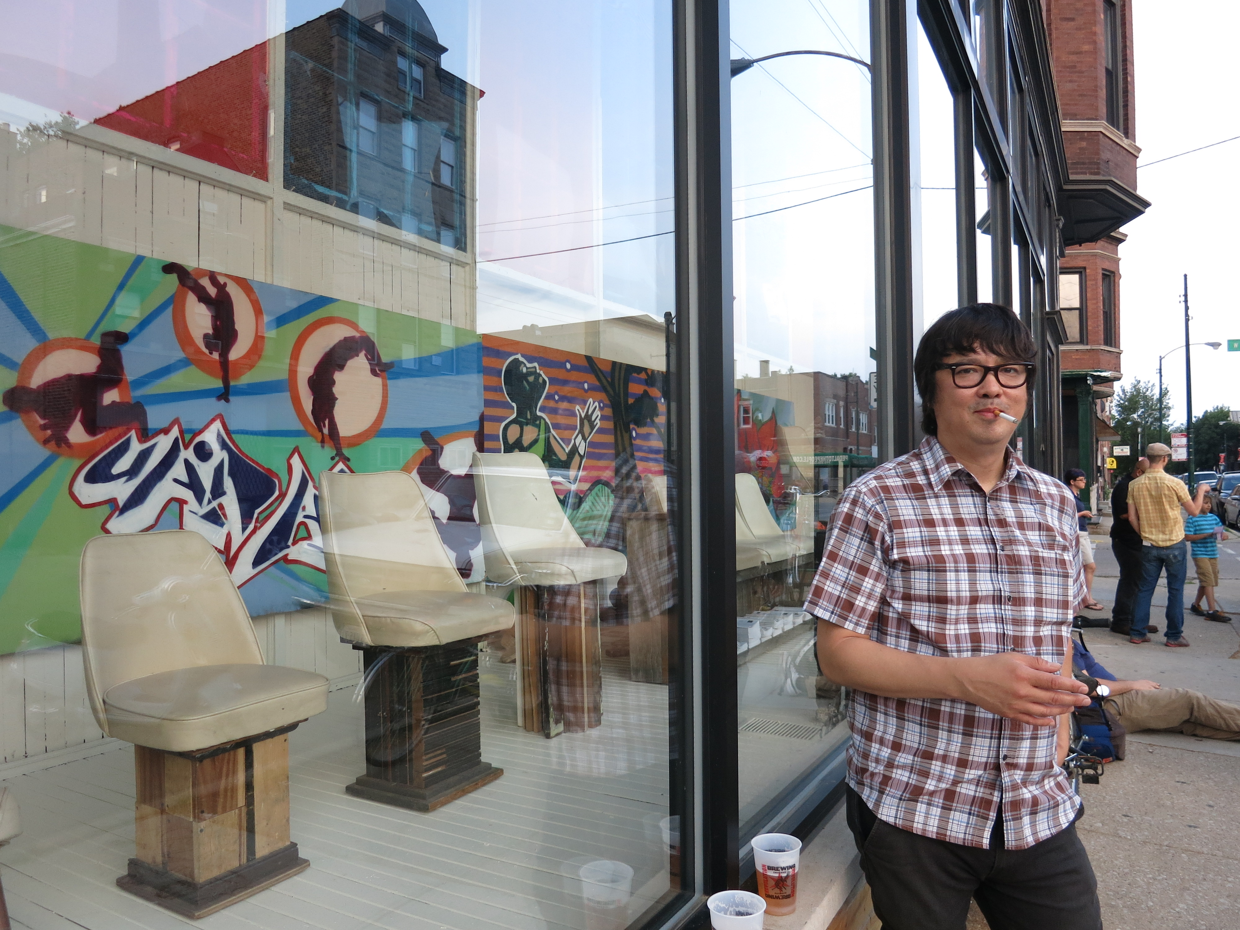 Edmar